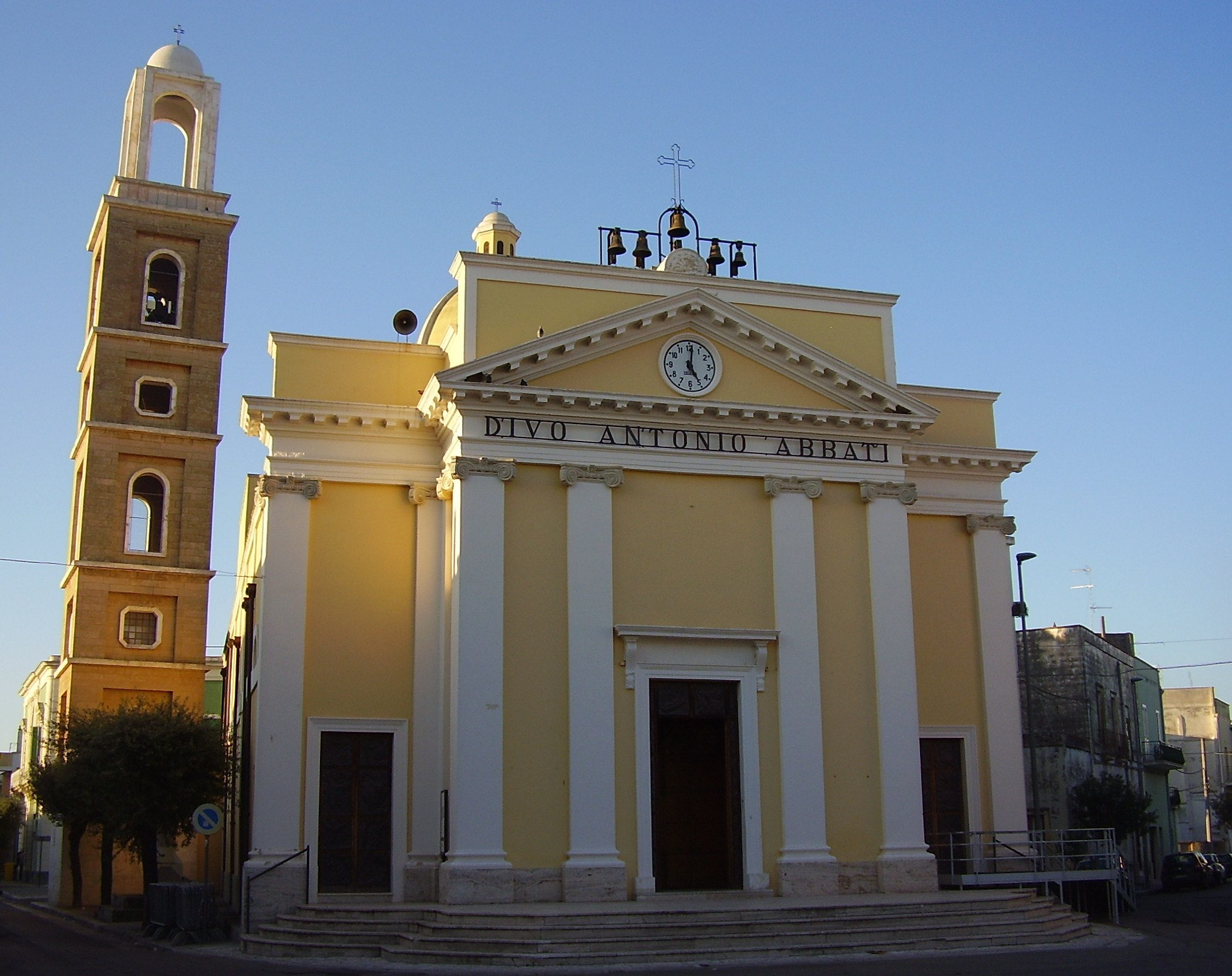 Chiesa Sant'Antonio Abate Novoli, Lecce